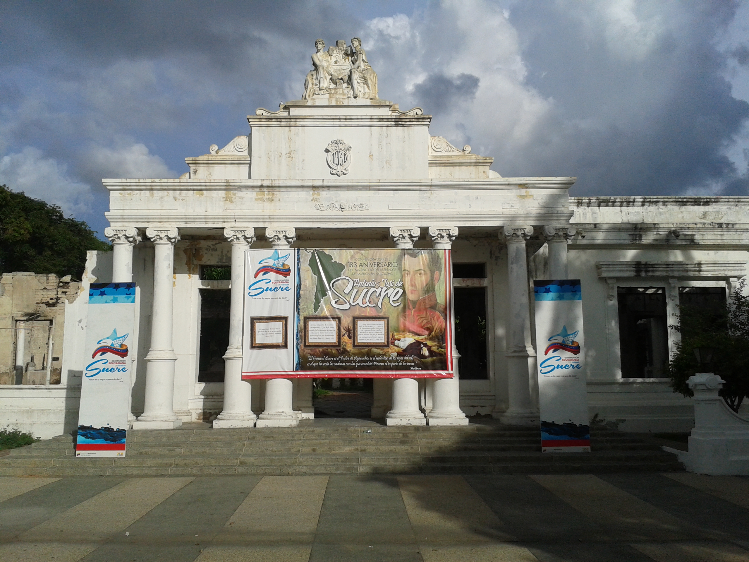 Vista frontal de las ruinas del Palacio de Gobierno, en Cumaná, Venezuela.